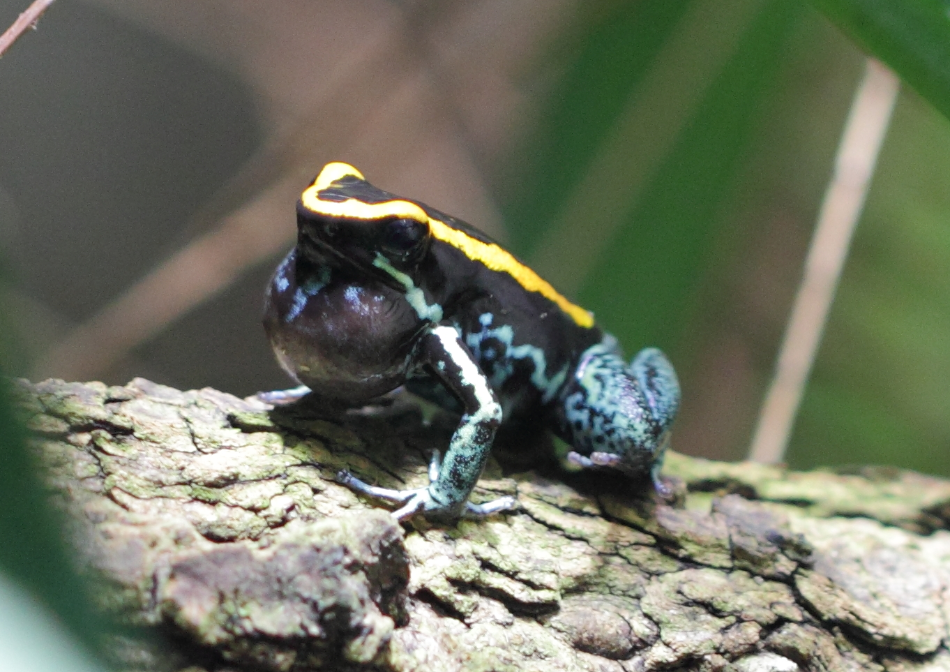 Ein Gestreifter Blattsteiger im Tiergarten Schönbrunn.